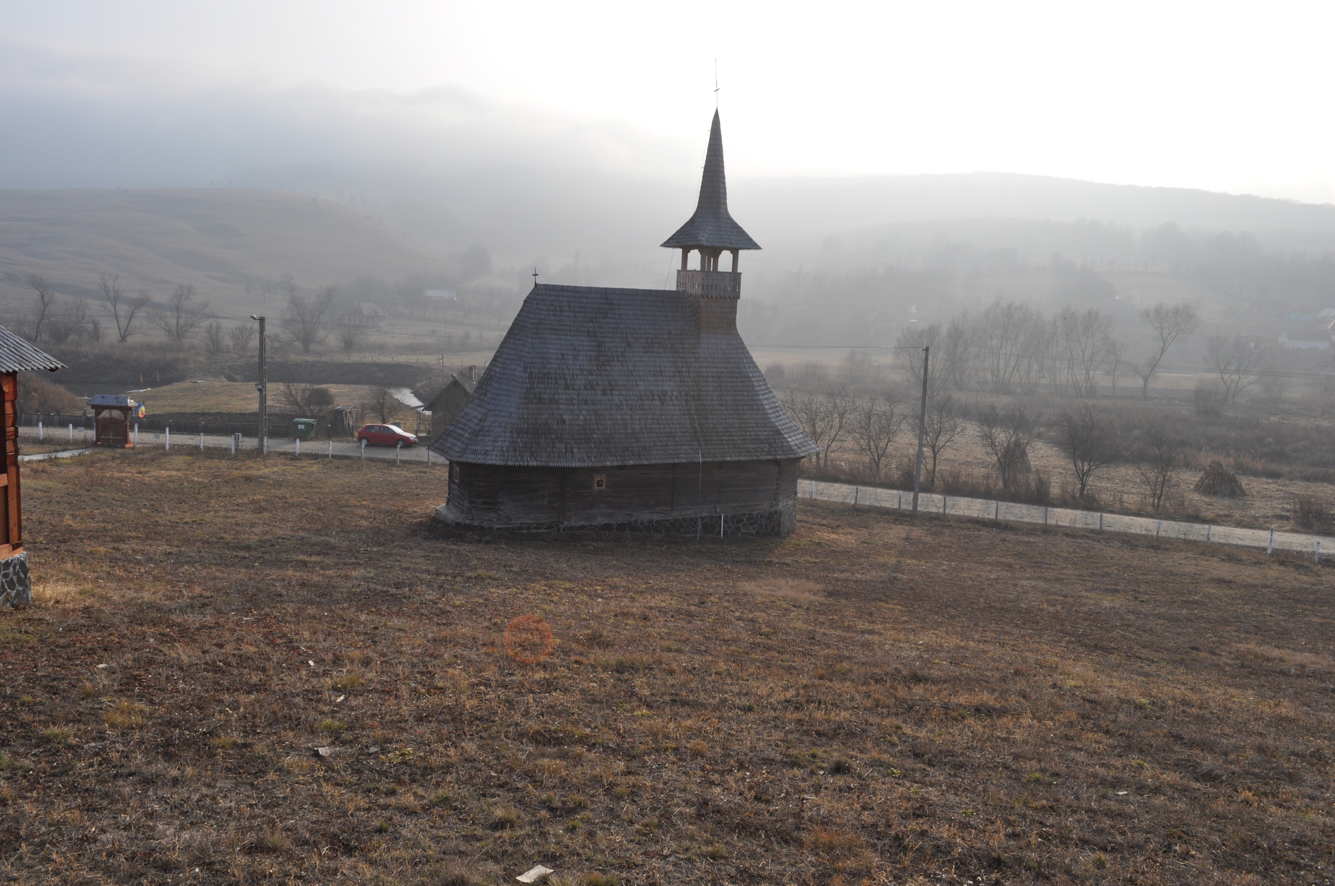 Biserica de lemn "Sfântul Petru" din Mureșenii de Câmpie